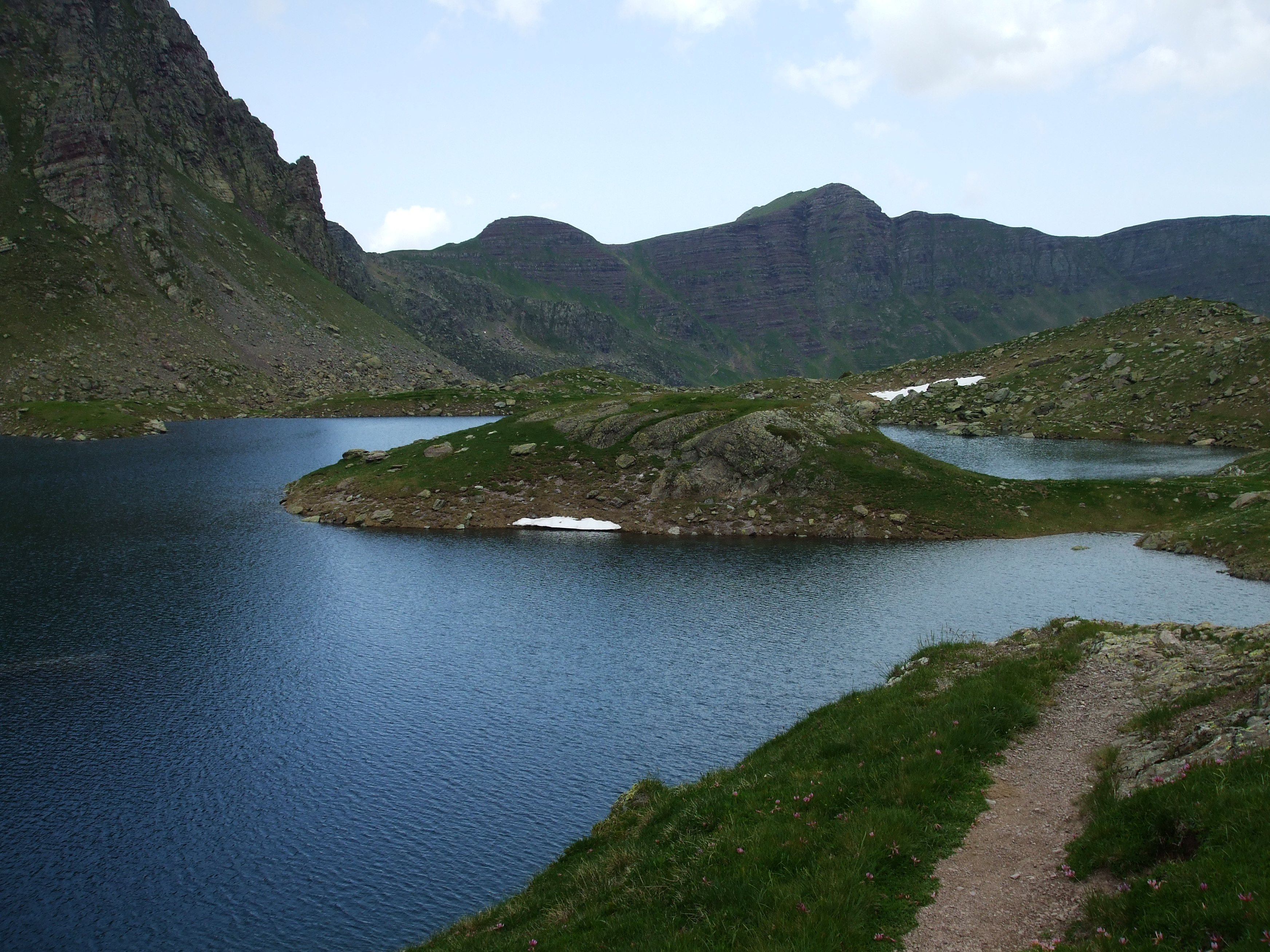 Lac Berseau, un des lacs d'Ayous (Pyrénées)